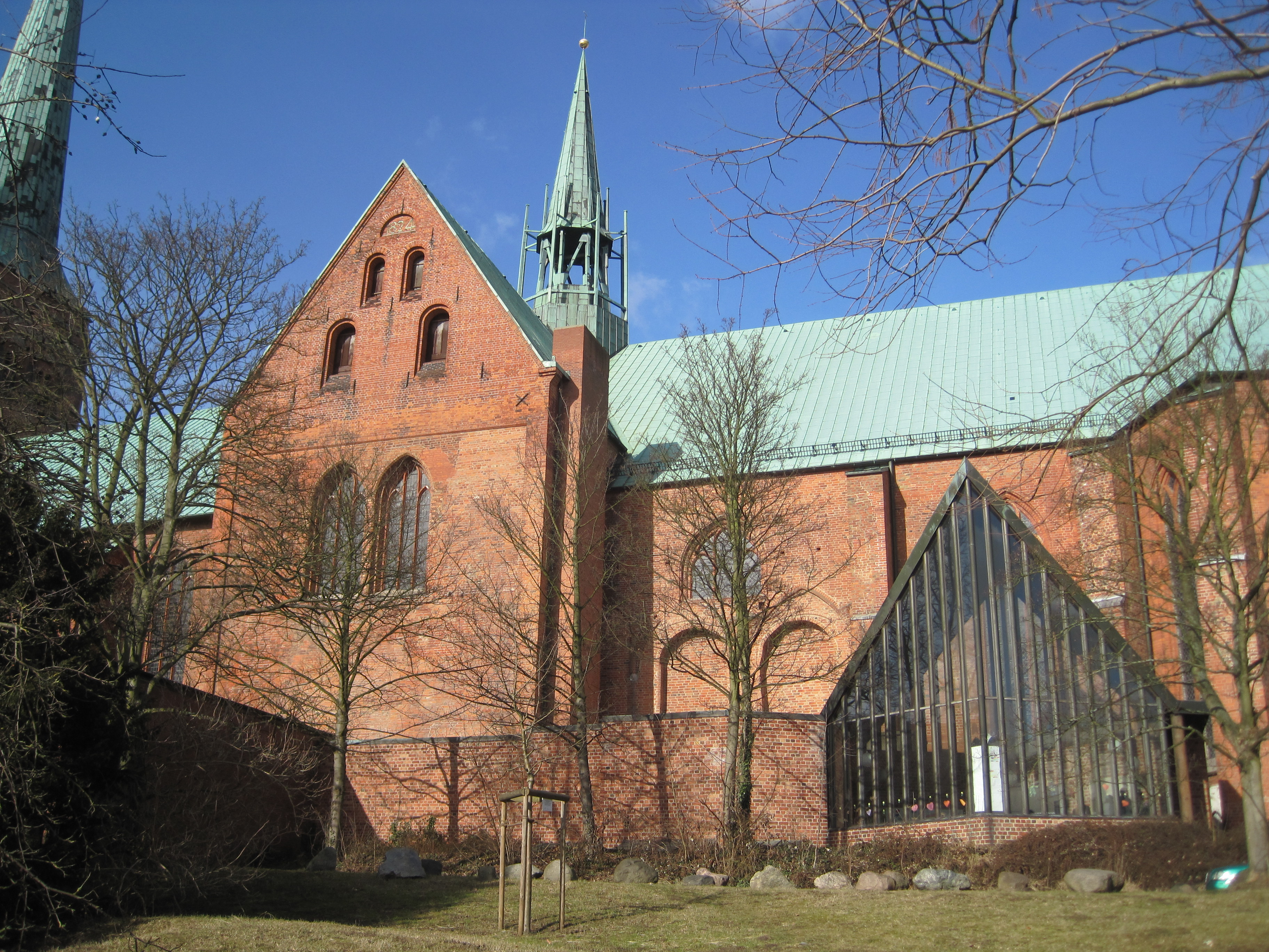 Giebel des Süderquerschiffs (erneuert 1824) und neue Südervorhalle des Lübecker Doms. Dazwischen im unteren Bereich unter dem Halbfenster die Gewölbeansätze der ehemaligen Rochuskapelle, die im Zweiten Weltkrieg zerstört wurde.